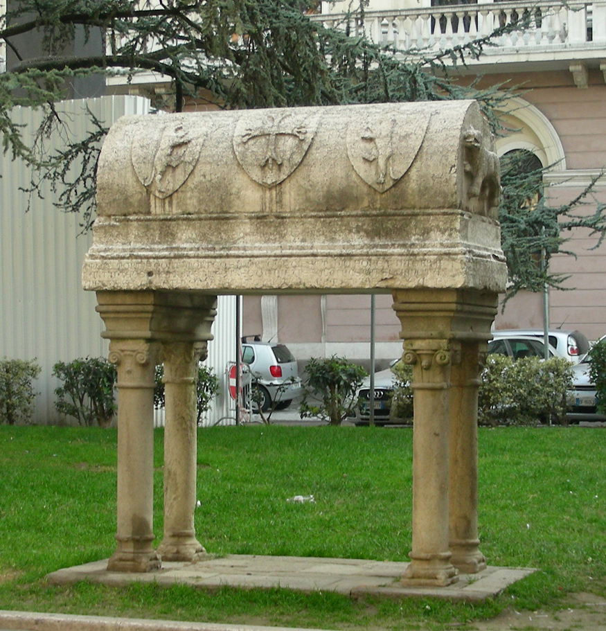 Padova, cosiddetta tomba di Antenore